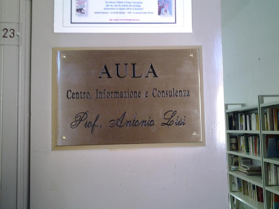 Targa di intitolazione al Prof.Lisi dell'aula C.I.C. del Liceo Scientifico "Carlo Jucci"- Rieti